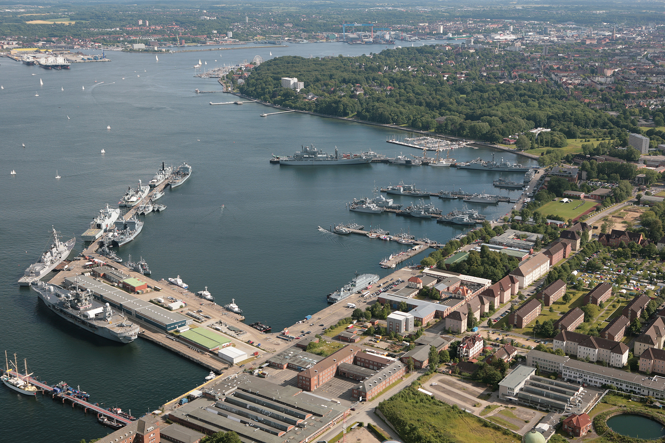 Luftaufnahme des Marinestützpunktkommandos Kiel [1]